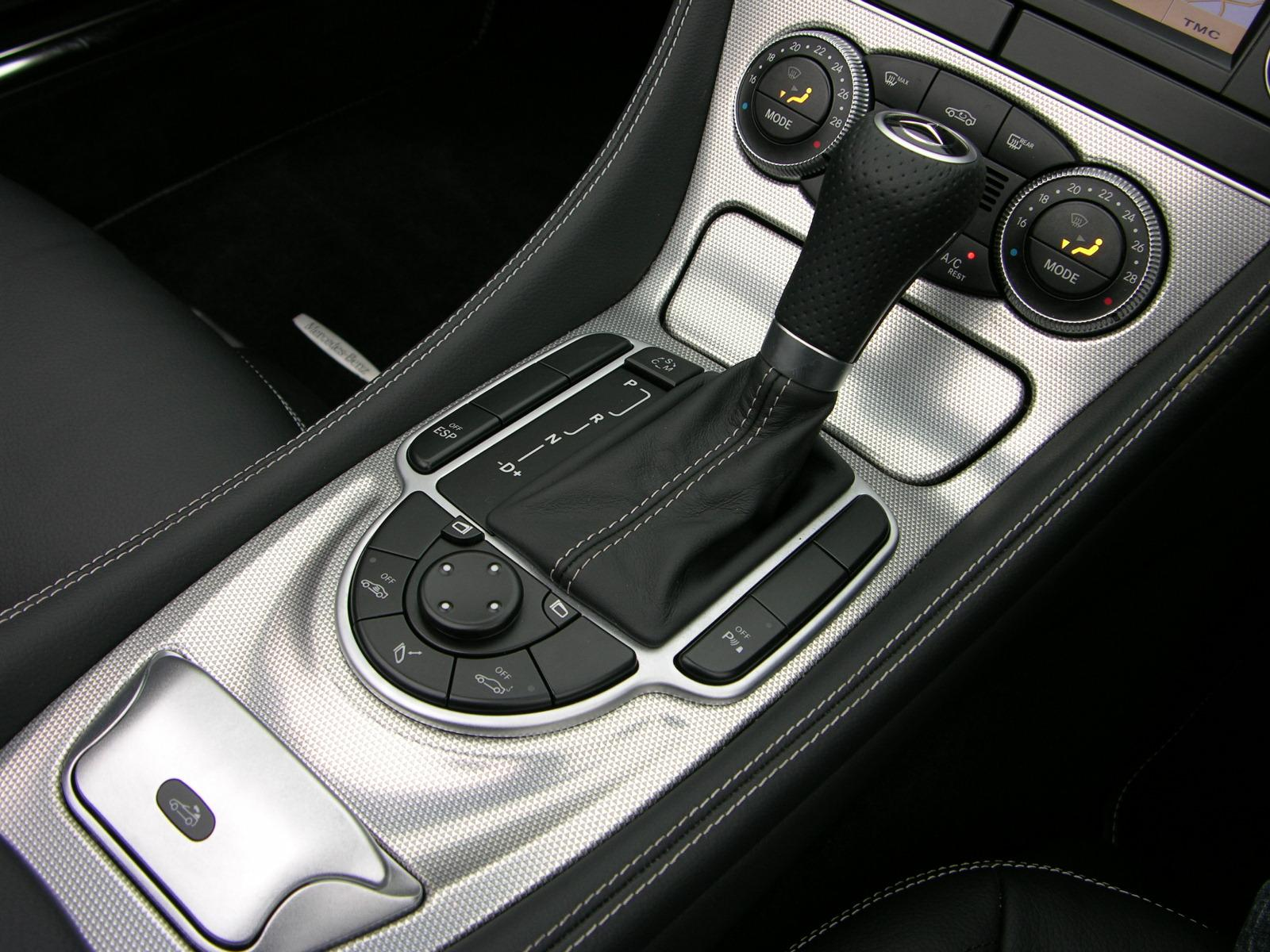 2009 Mercedes Benz SL350